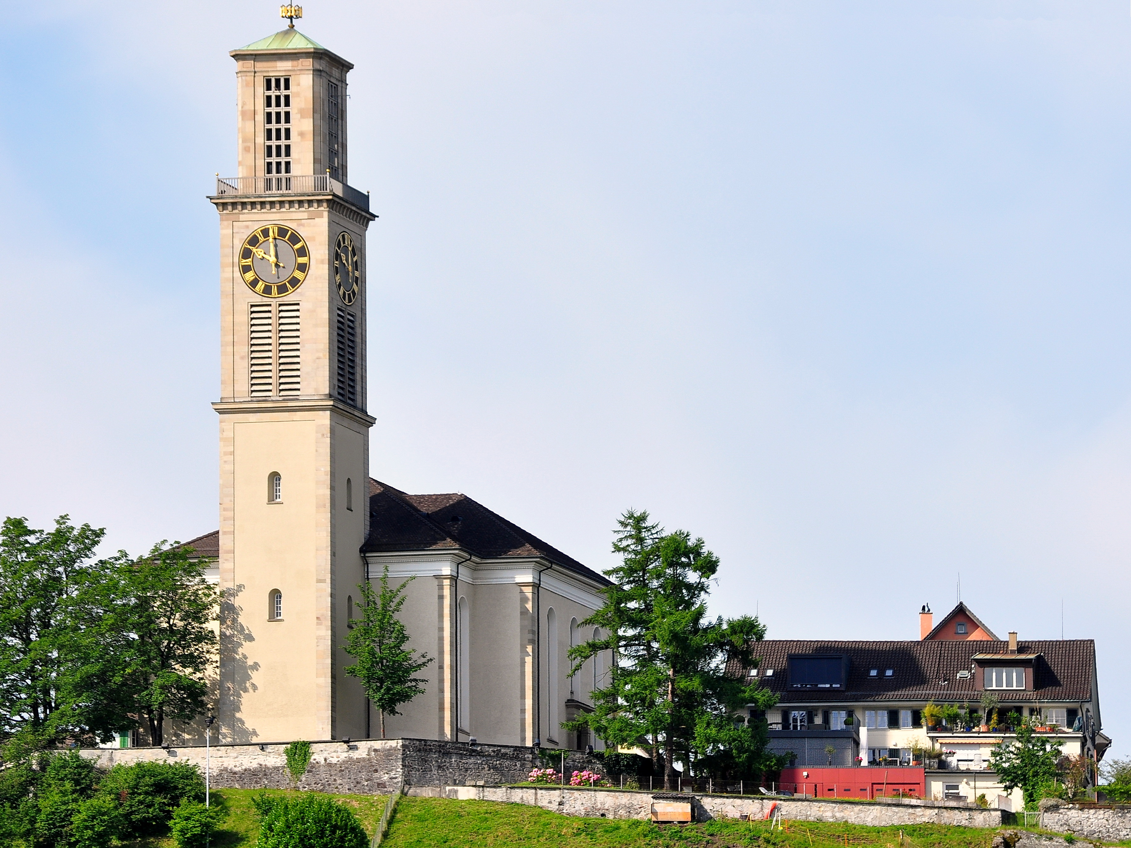 Reformierte Kirche Thalwil as seen from Zürichsee-Schiffahrtsgesellschaft (ZSG) MS Wädenswil on Zürichsee in Switzerland